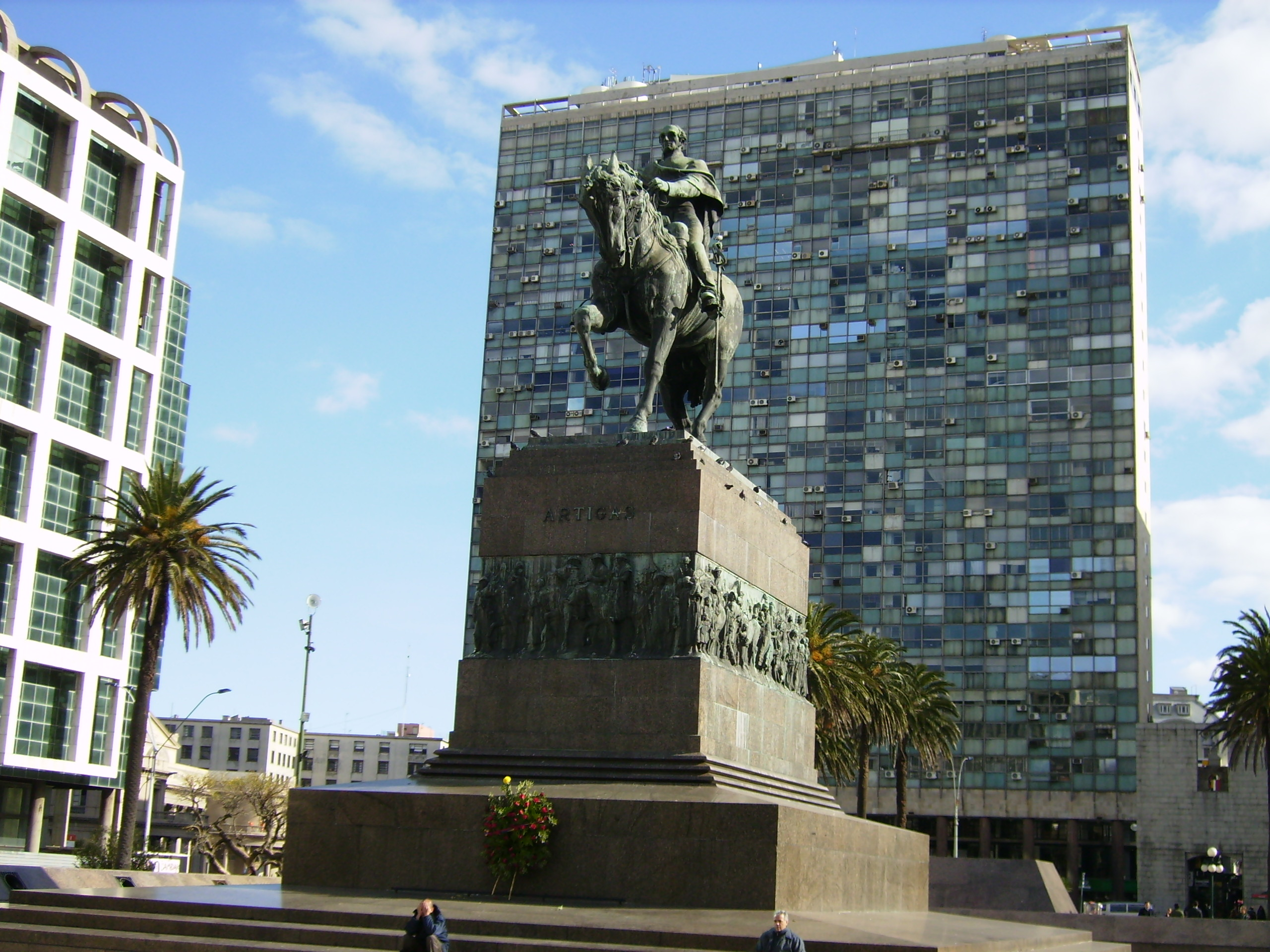 Monumento ecuestre a José Artigas, Plaza Independencia, Montevideo, Uruguay.